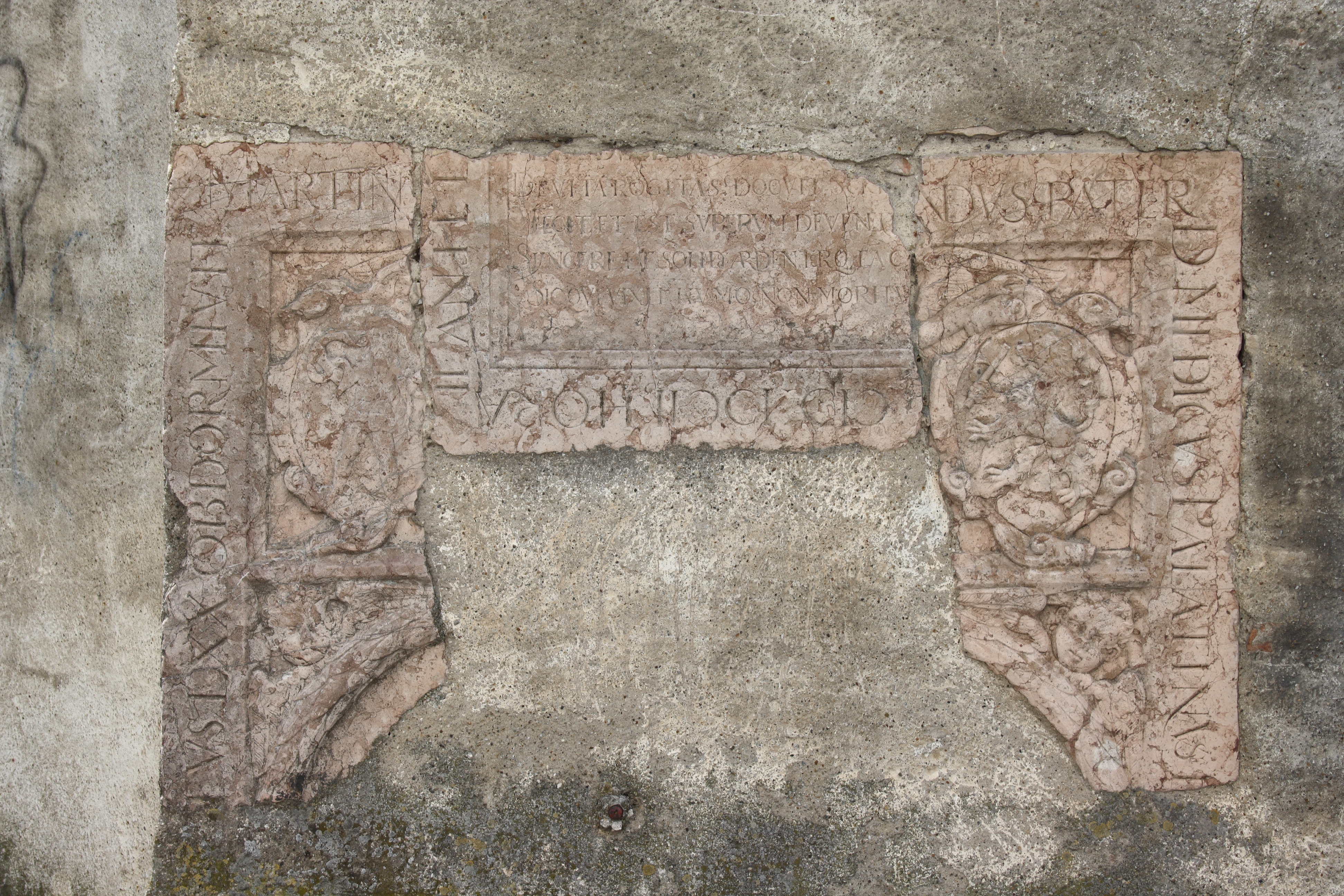 Mauerturm der Stadtbefestigung in Lauingen im Landkreis Dillingen an der Donau (Bayern) am Oberanger, hinter der Stadtpfarrkirche St. Martin, Fragment der Grabplatte für Martin Ruland der Ältere